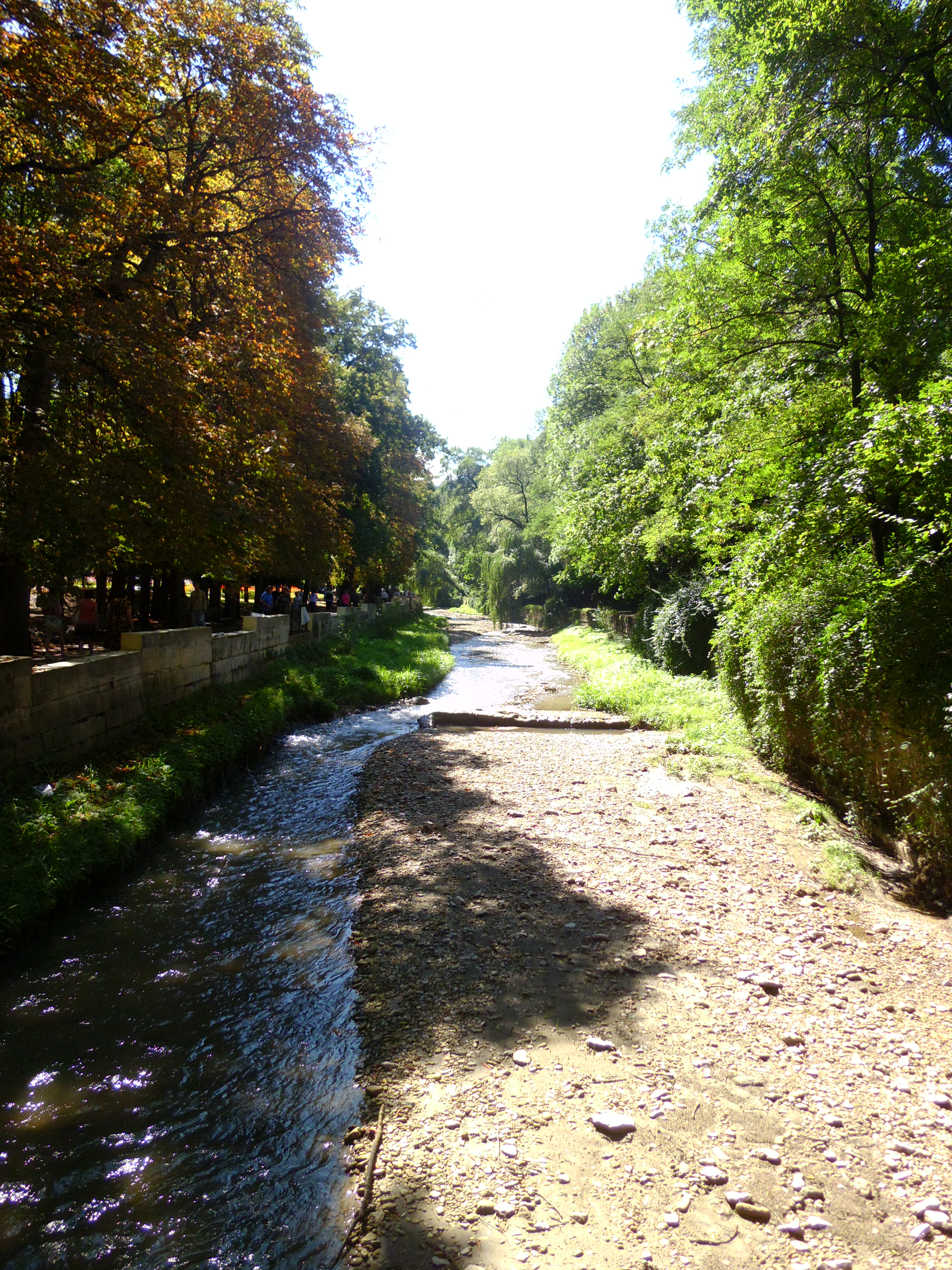 Река Ольховка в Курортном парке Кисловодска